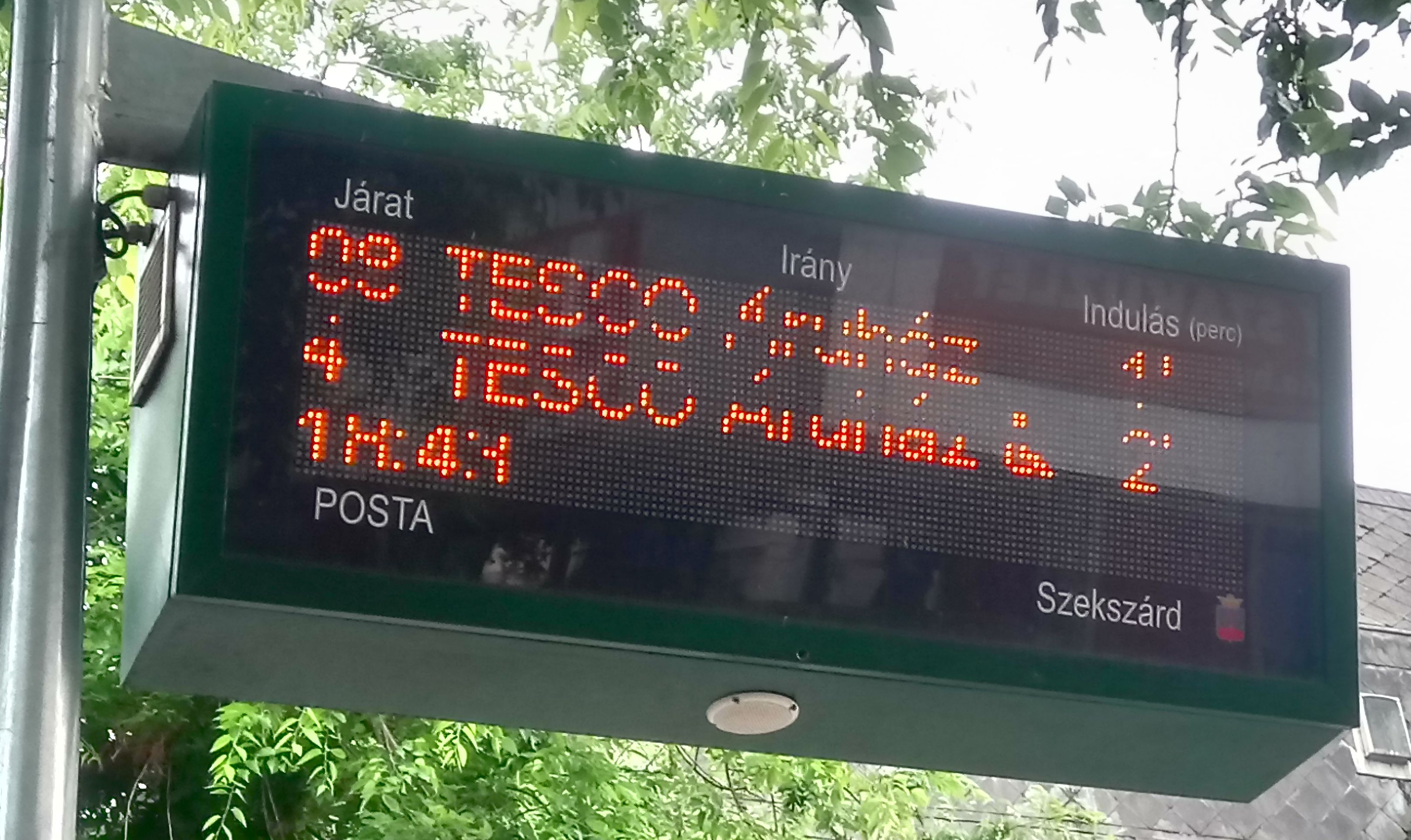 Utastájékoztató tábla